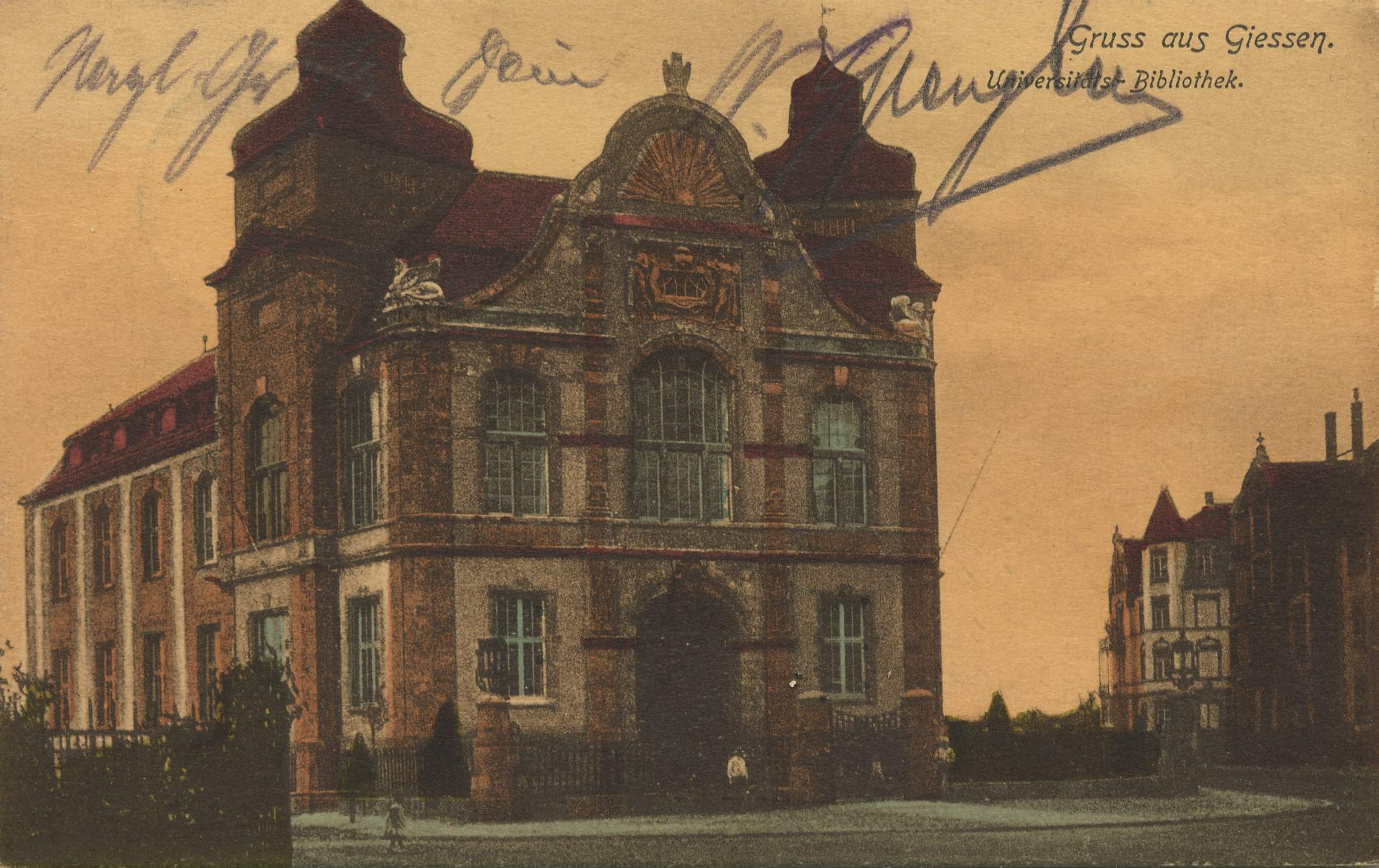 1904–1944 Universitätsbibliothek, Gießen, Germany. Jugendstilbau mit zwei Türmen an der großen Portalseite. Auf dem Dach, über dem Eingang der Portalseite, eine steinerne Eule.